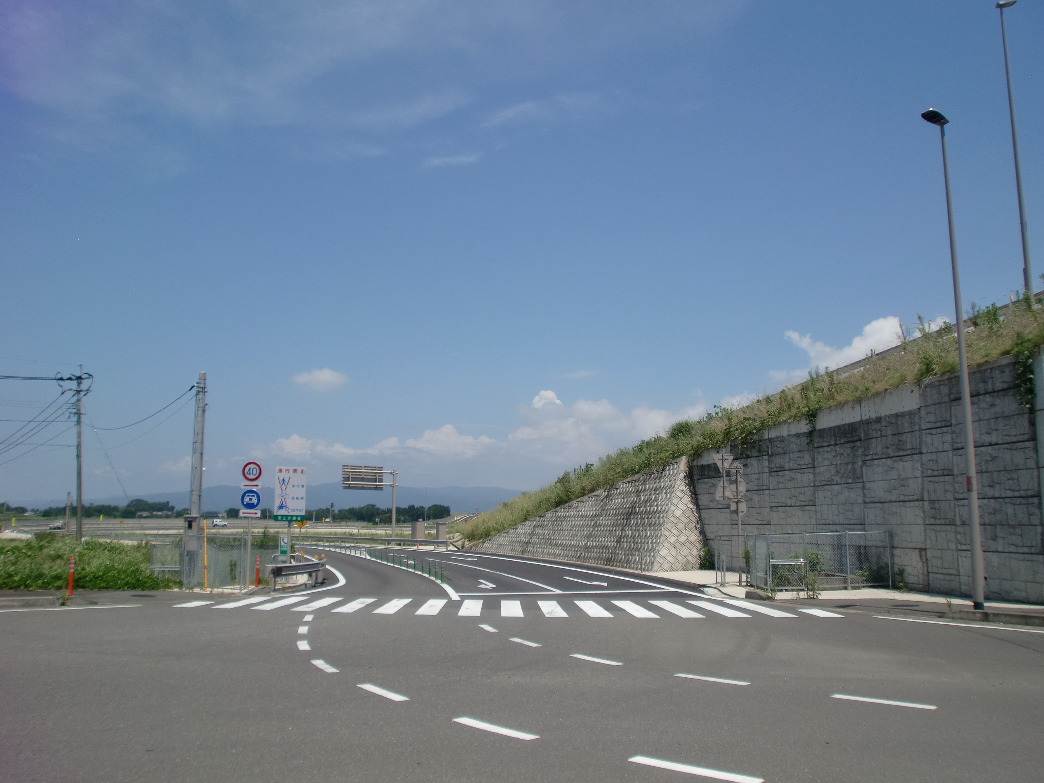 野田インターチェンジの出入口